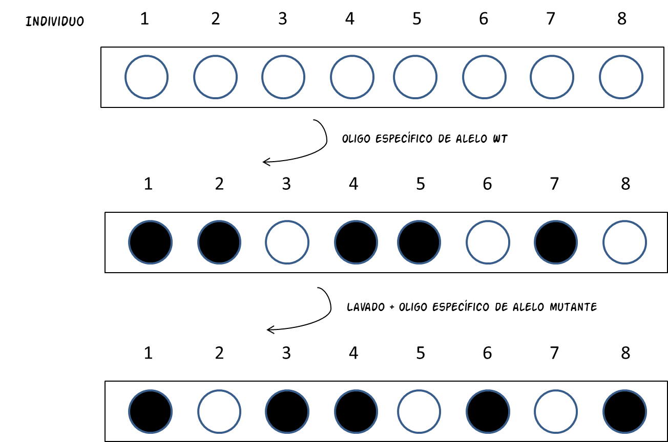 Ilustración de un hipotético resultado de un ASO dot blot